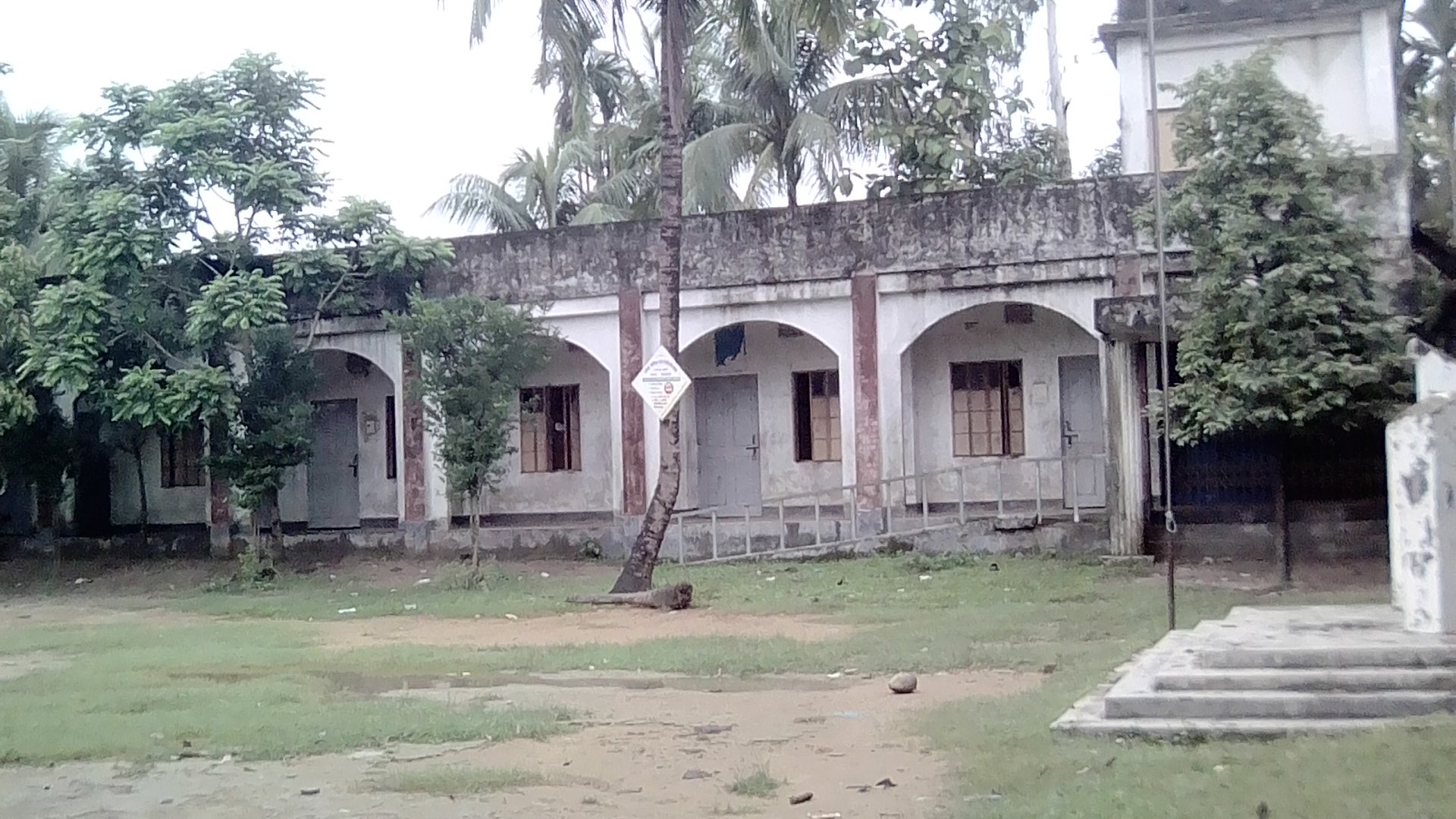 Manikpur High School মানিকপুর উচ্চ বিদ্যালয়